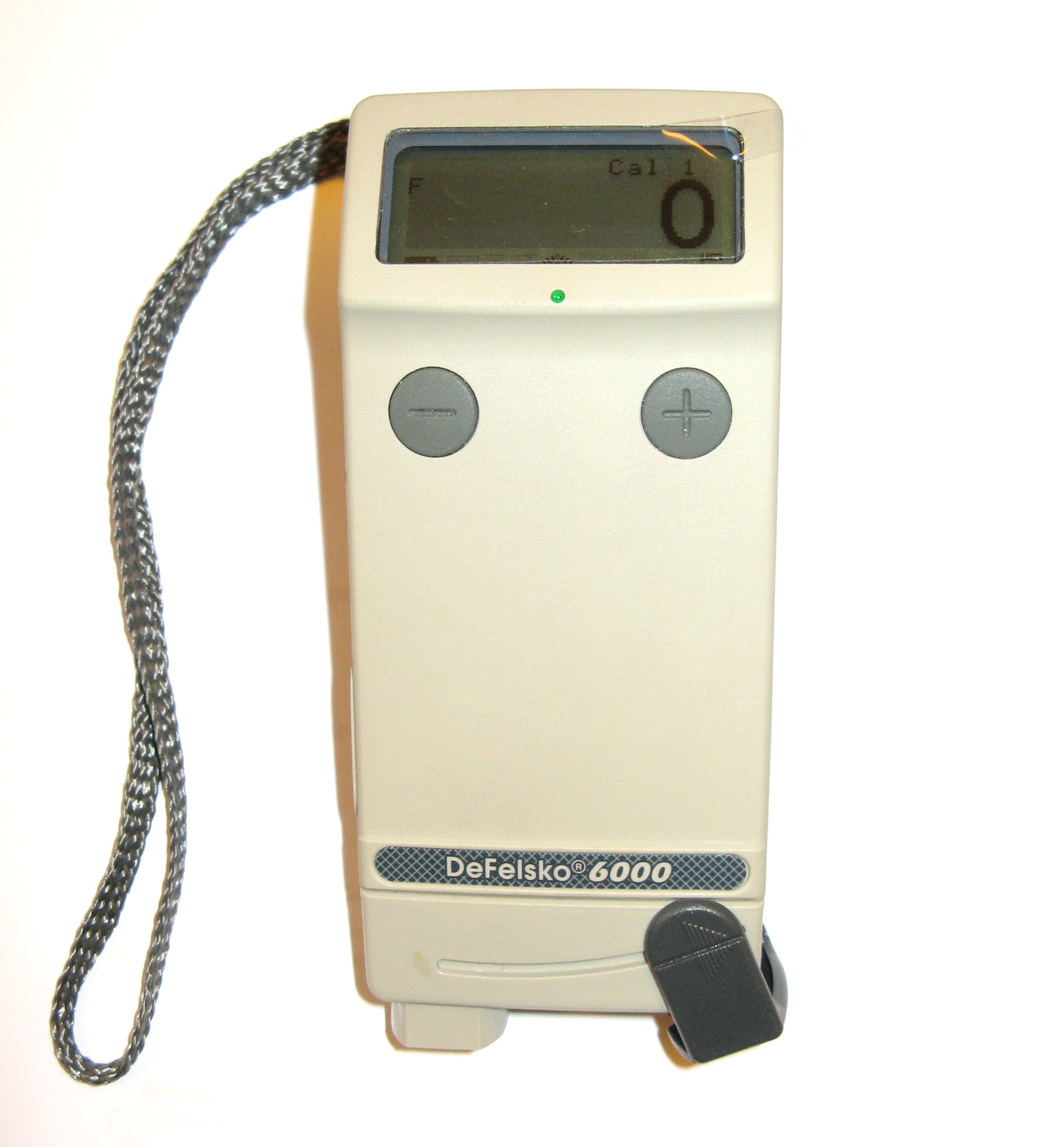 defelsko 6000